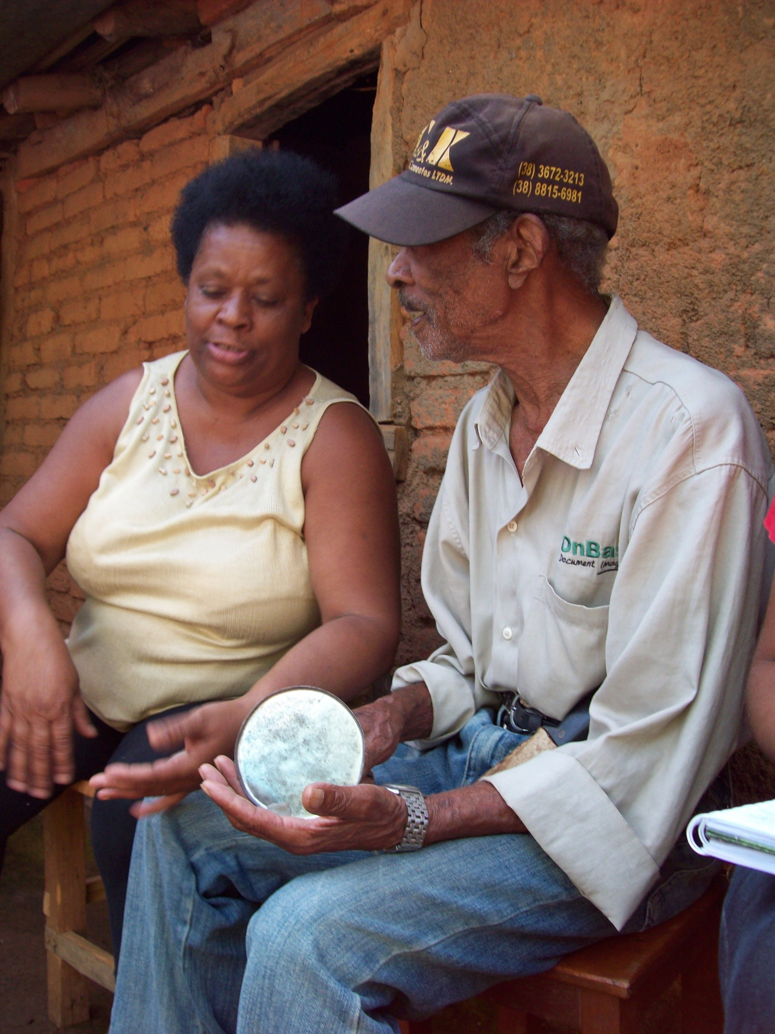 Moradores Tradicionais da Comunidade Quilombola de São Domingos - Paracatu MG